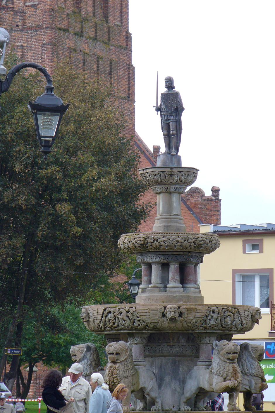 Prabuty - 1 godz. po odsłonięciu figury Rolanda na prabuckim rynku na szczycie fontanny jego imienia w 65 lat po zaginięciu pierwowzoru, 24.09.2011